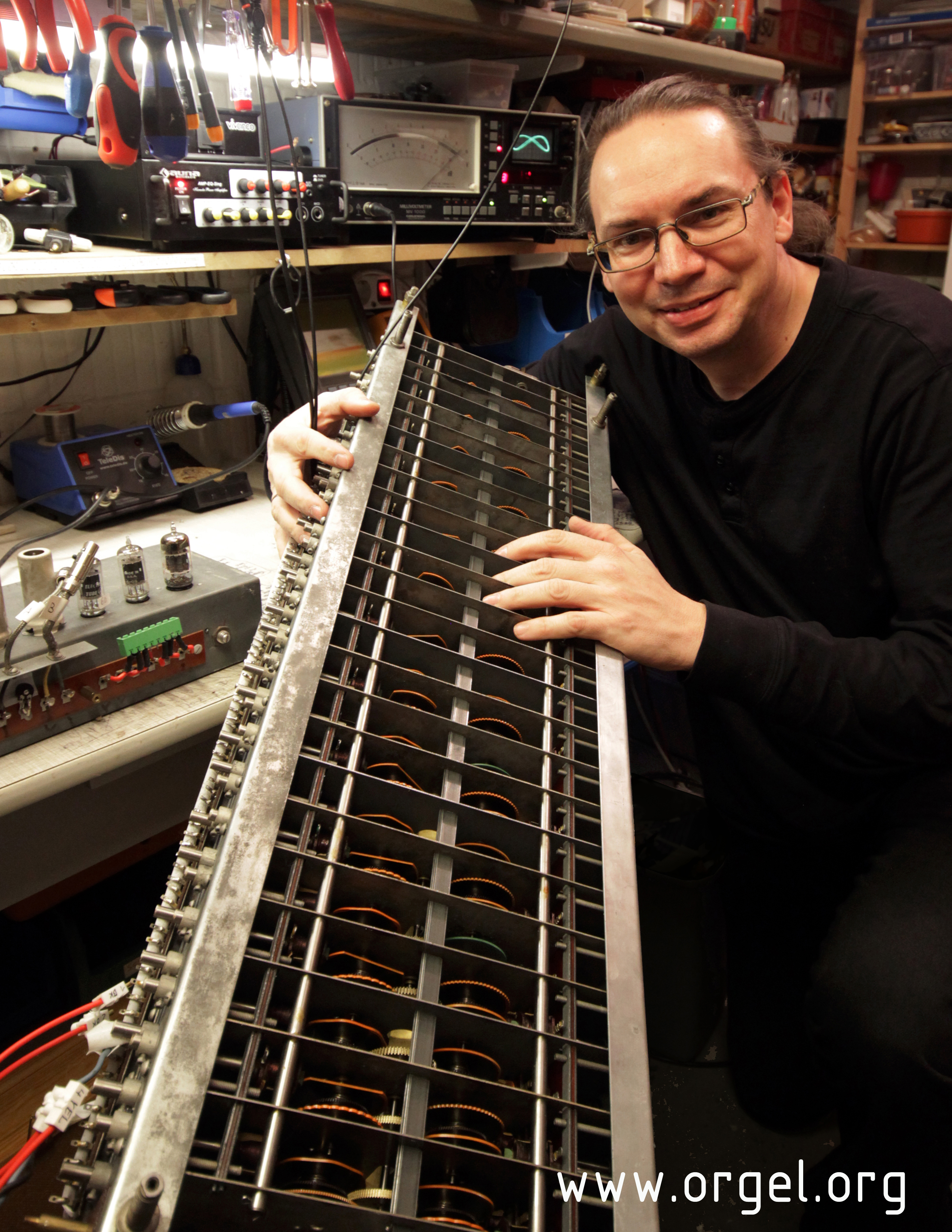 Seltener Blick auf die Tonräder des Tongenerators einer Hammond CV von 1946.